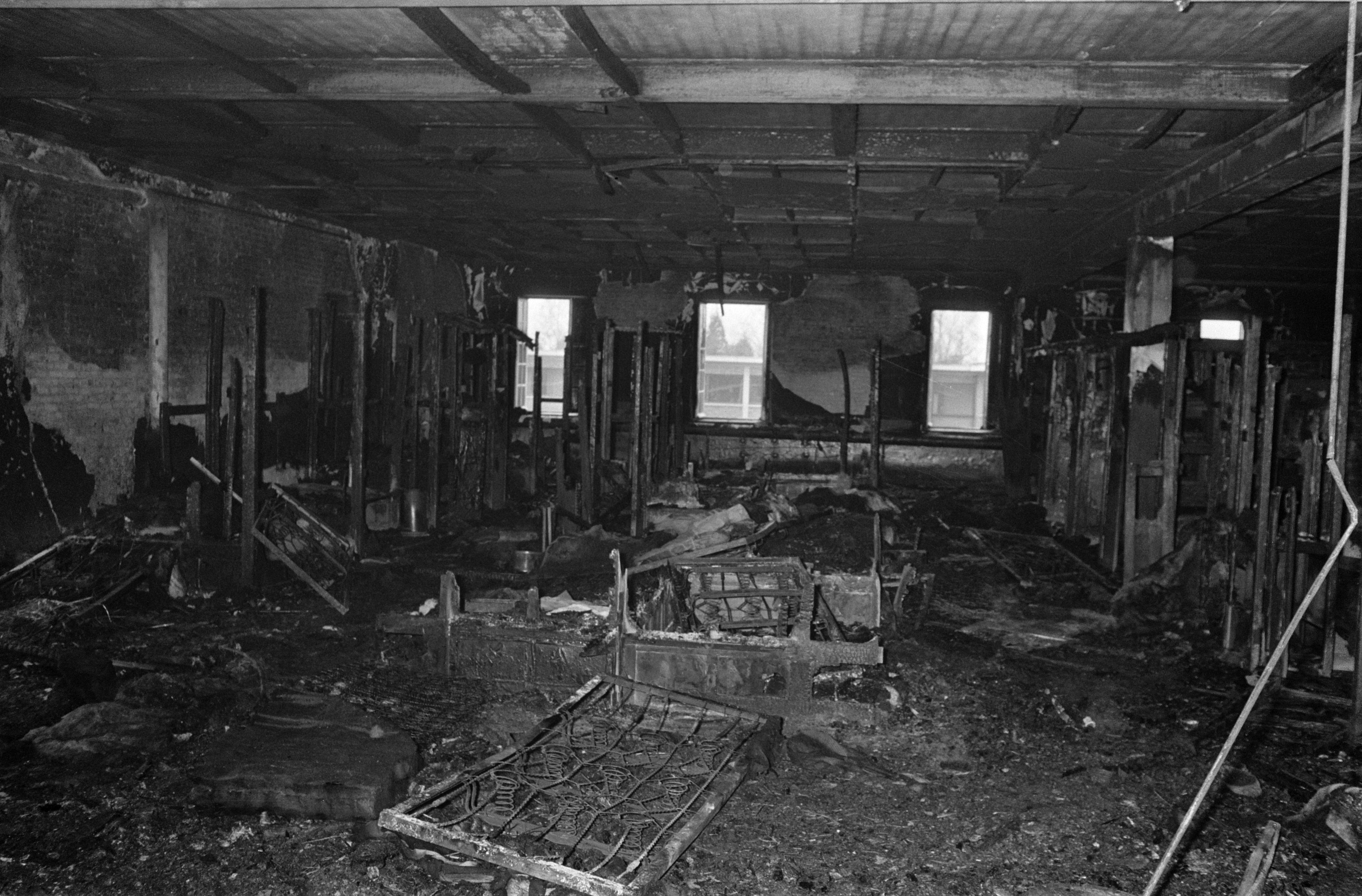 Collectie / Archief : Fotocollectie Anefo Reportage / Serie : Een brand in het Heilig-Hartcollege in Heusden, waarbij 23 doden te betreuren waren Beschrijving : De uitgebrand slaapzaal Datum : 25 januari 1974 Locatie : België , Heusden Trefwoorden : branden, slaapzalen Fotograaf : Fotograaf Onbekend / Anefo Auteursrechthebbende : Nationaal Archief Materiaalsoort : Negatief (zwart/wit) Nummer archiefinventaris : bekijk toegang 2.24.01.05 Bestanddeelnummer : 926-9662